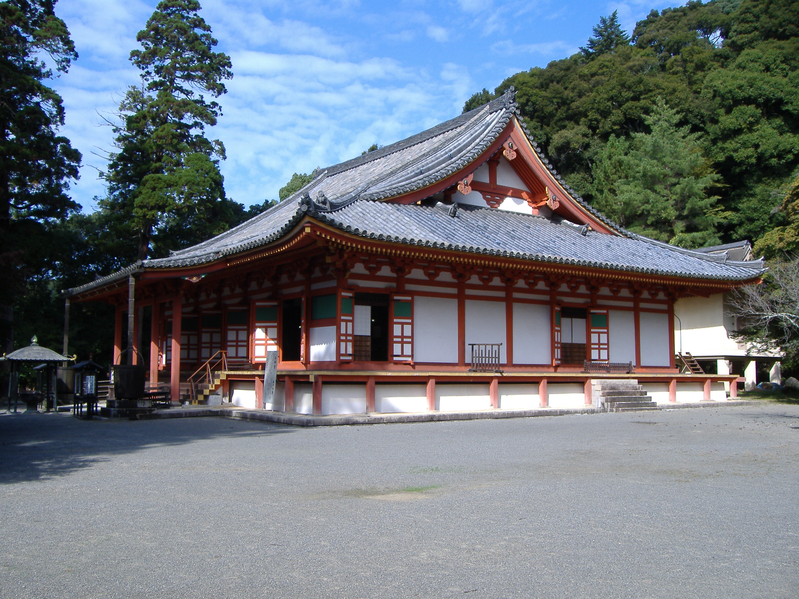 2005年1月1日 hiro撮影 観心寺にて(大阪府河内長野市)